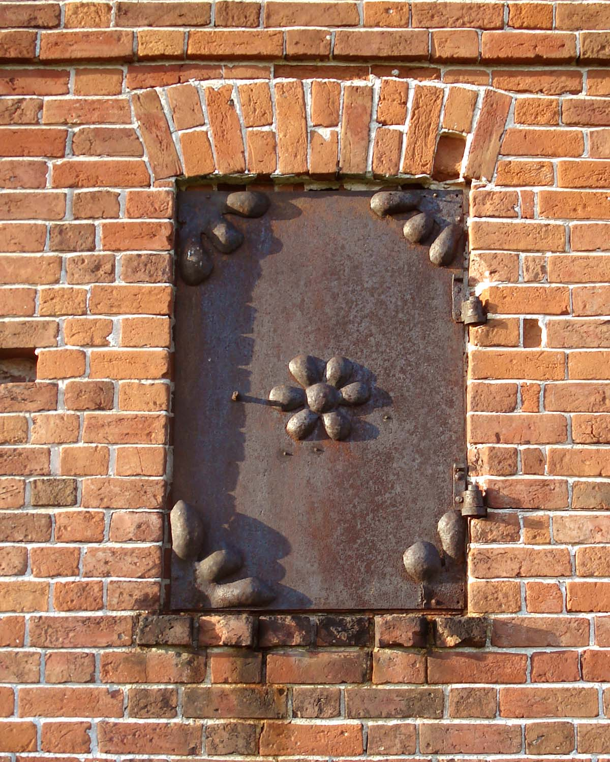 Фрагмент амбара. Яковцево, Вачский р-н Ниегородской обл.